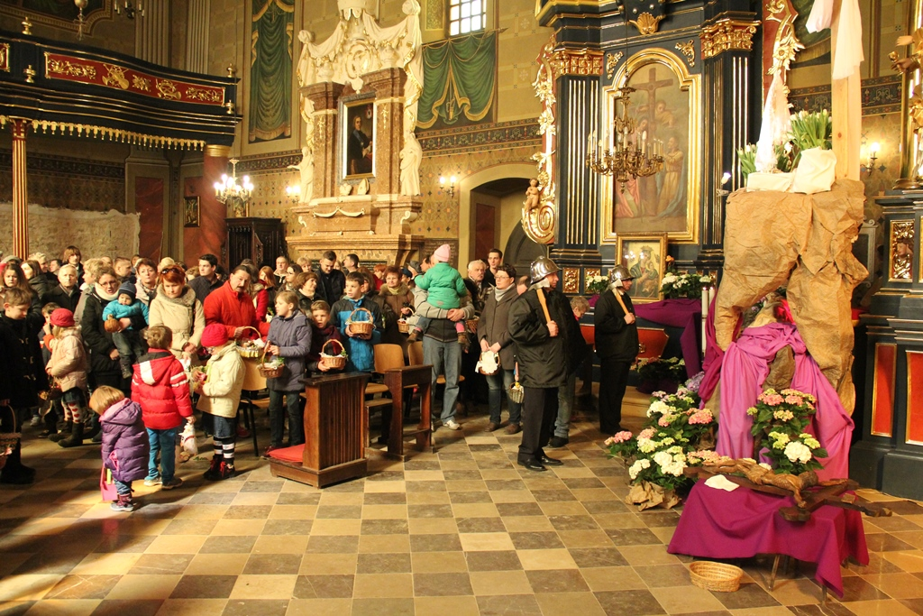 Święcenie pokarmów w miejscowości Sławków. Jest to polska tradycja związana ze świętem Wielkanocy, odbywa się w Wielką Sobotę.